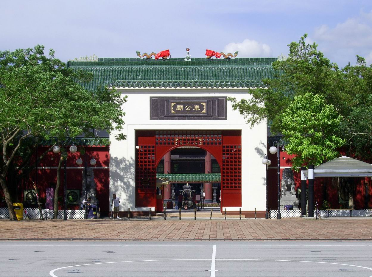 中文（香港）: 車公廟正門